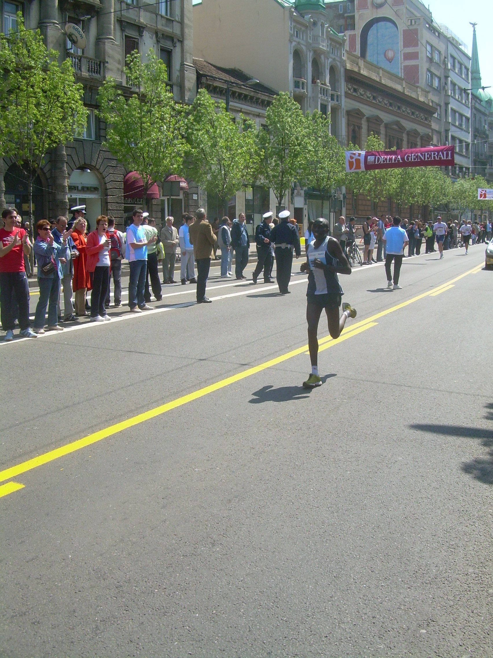 23. Београдски маратон, победник маратонске трке. Кенијац Џонстон Кибет Мајо на правцу пред циљ. Слика направљена 18. априла 2010 на Теразијама.